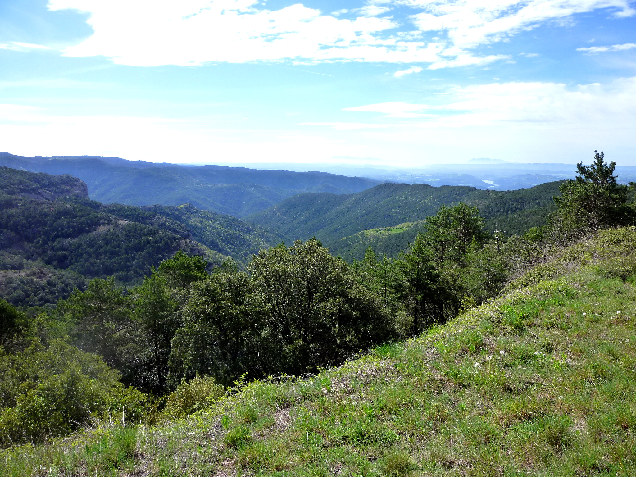 La rasa de la Salada Vella des de la seva capçalera, a la carretera de Solsona a Coll de Jou, a l'est del municipi de Lladurs (Solsonès - Catalunya)